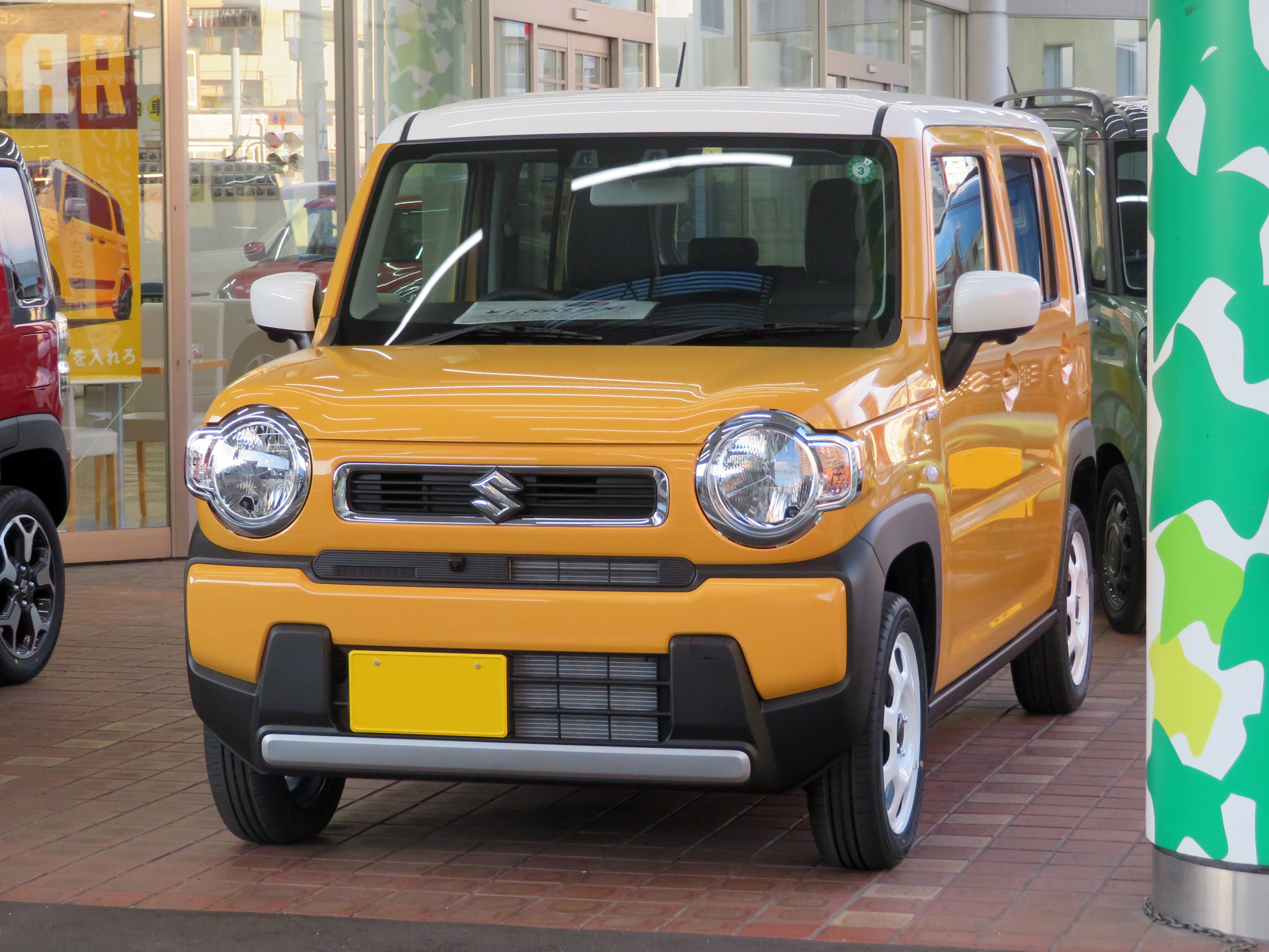 5AA-MR92S-HBGB-JN型スズキ・ハスラーHYBRID G 2WDをフロントから撮影。